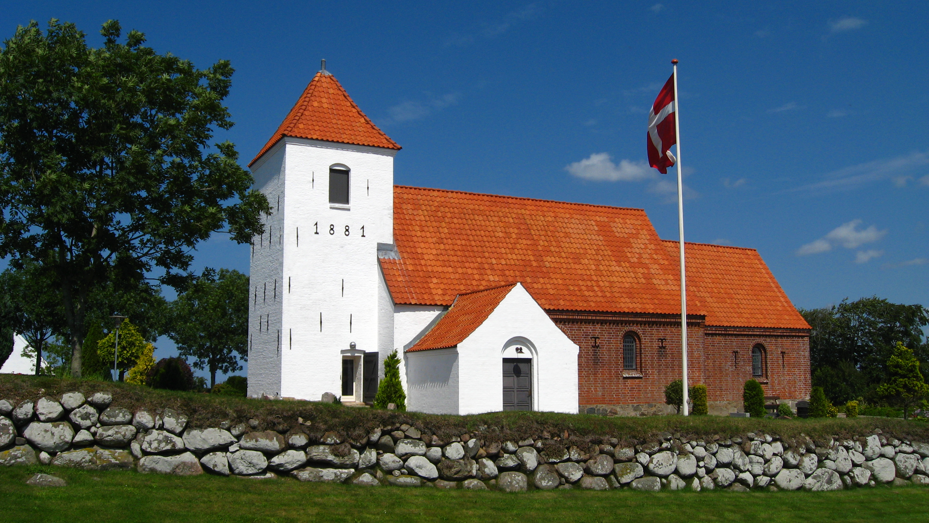 Øster Svenstrup Kirke